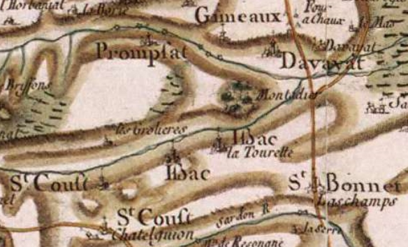 Mentions d'Yssac-la-Tourette et Yssac (actuellement commune du canton de Combronde, département du Puy-de-Dôme) sur la carte de Cassini (extrait).